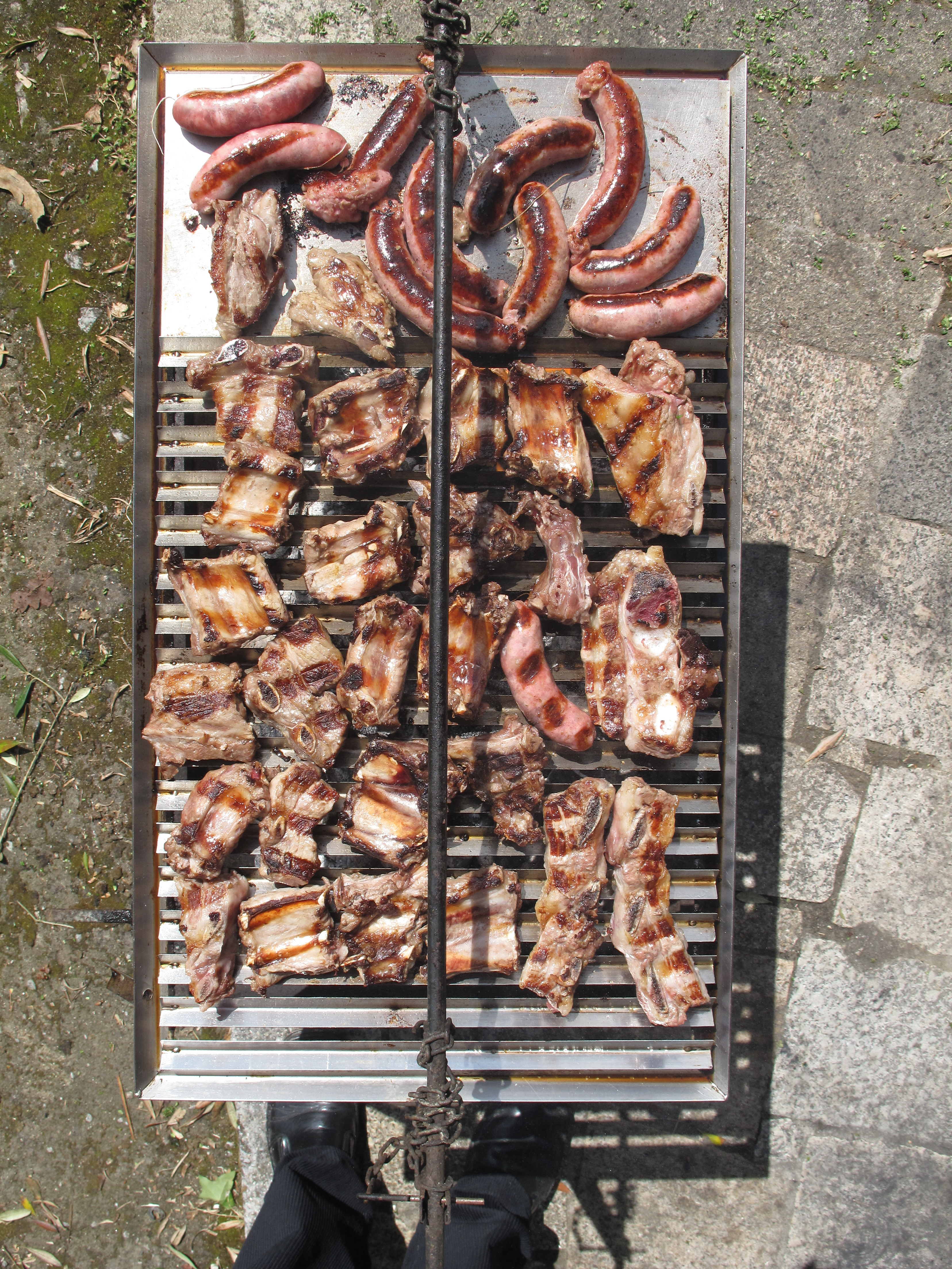 Churrasco en Vilarromarís, Oroso, Galiza